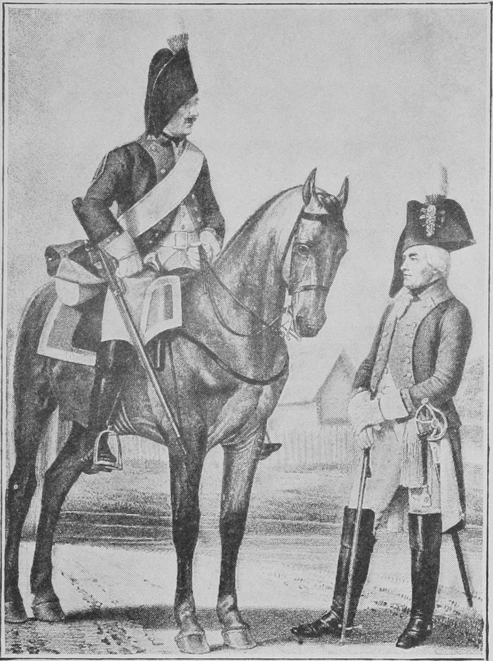 Рядовой и офицер Владимирского драгунского полка (1797—1801 гг.). Данное изображение было использовано в статье «Владимирский, 13-й уланский, полк» опубликованной в шестом томе «Военной энциклопедии», который был издан книгоиздательским товариществом Ивана Дмитриевича Сытина в 1912 году в столице Российской империи городе Санкт-Петербурге.